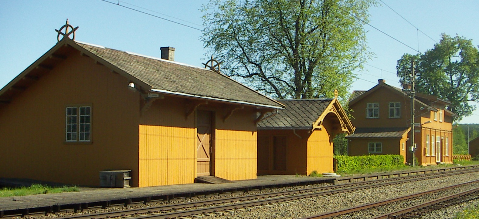 Bilde av jernbanestasjonen ved Åbogen i Eidskog kommune. Stasjonsbygningen er tegnet av Georg Andreas Bull.